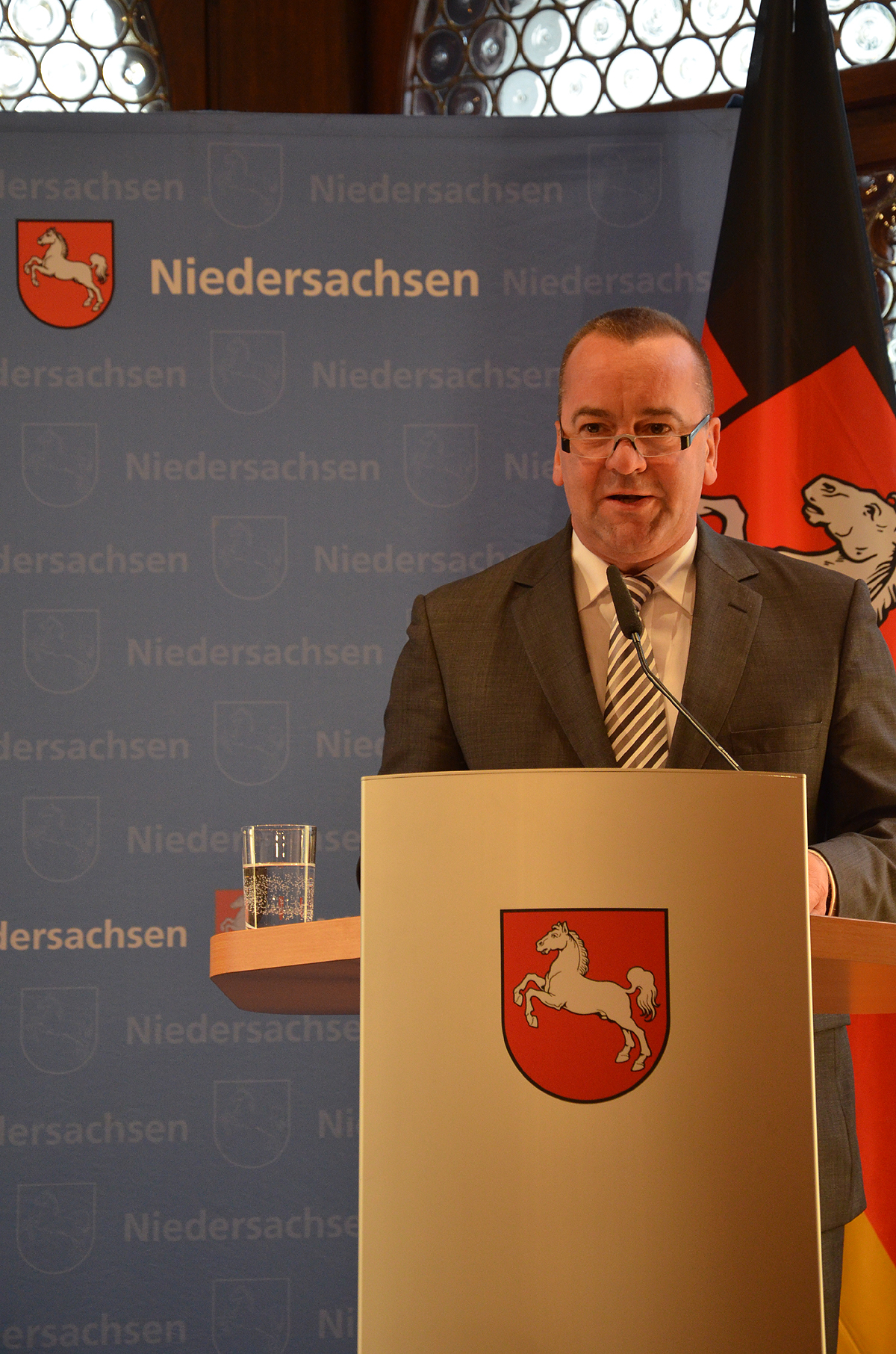 Der Niedersächsische Minister für Inneres und Sport, Boris Pistorius, hier am Rednerpult im Gästehaus der Niedersächsischen Landesregierung bei seiner teils sehr persönlichen Würdigungs- und Wertschätzungs-Rede für das ehrenamtliche Engagement der Mitglieder des Beirats im Niedersächsischen Härtefonds für Hilfen an Verfolgte des NS-Regimes in besonderer Notlage ...